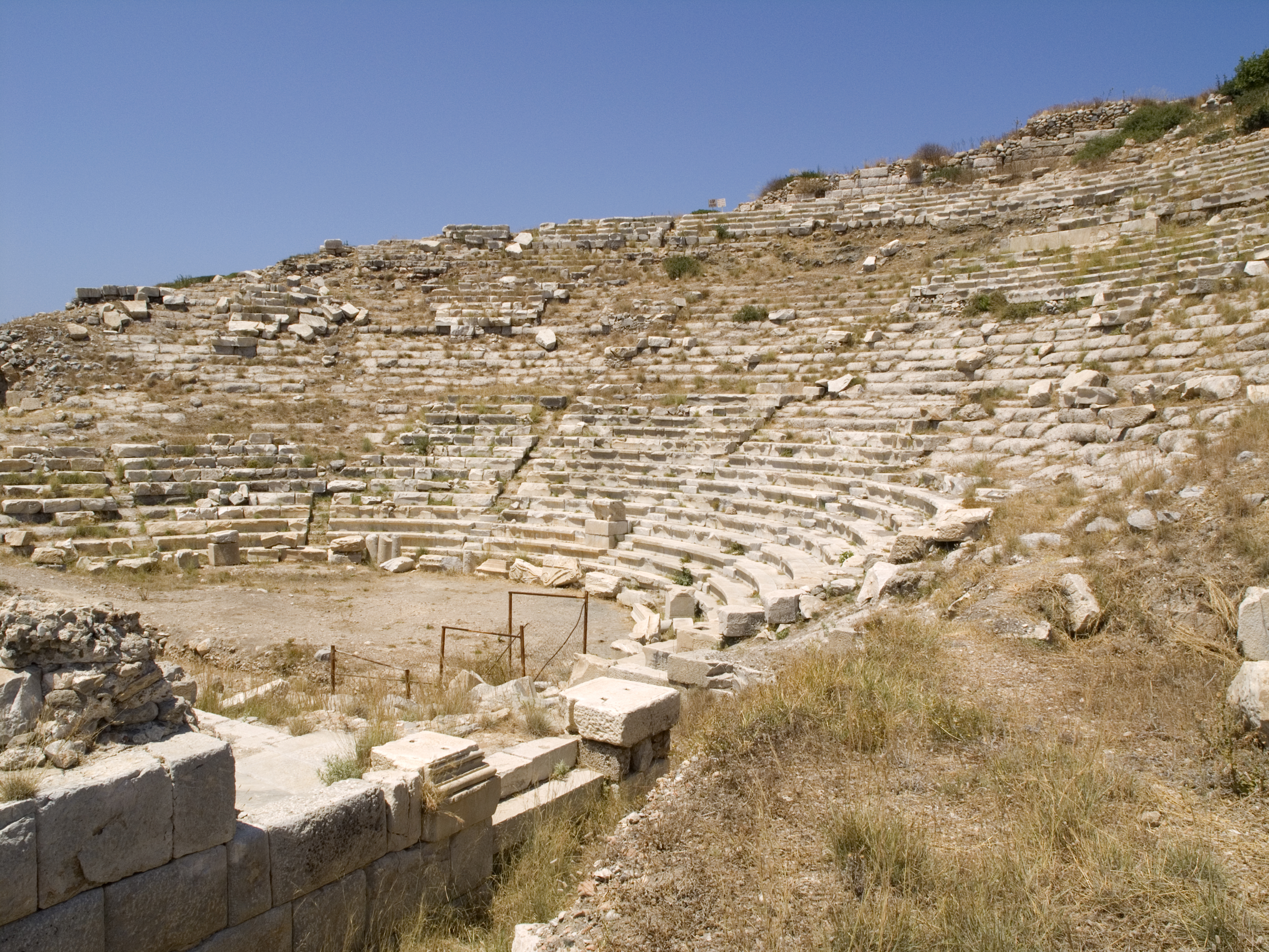 Турция, полуостров Датча – античный город Книд